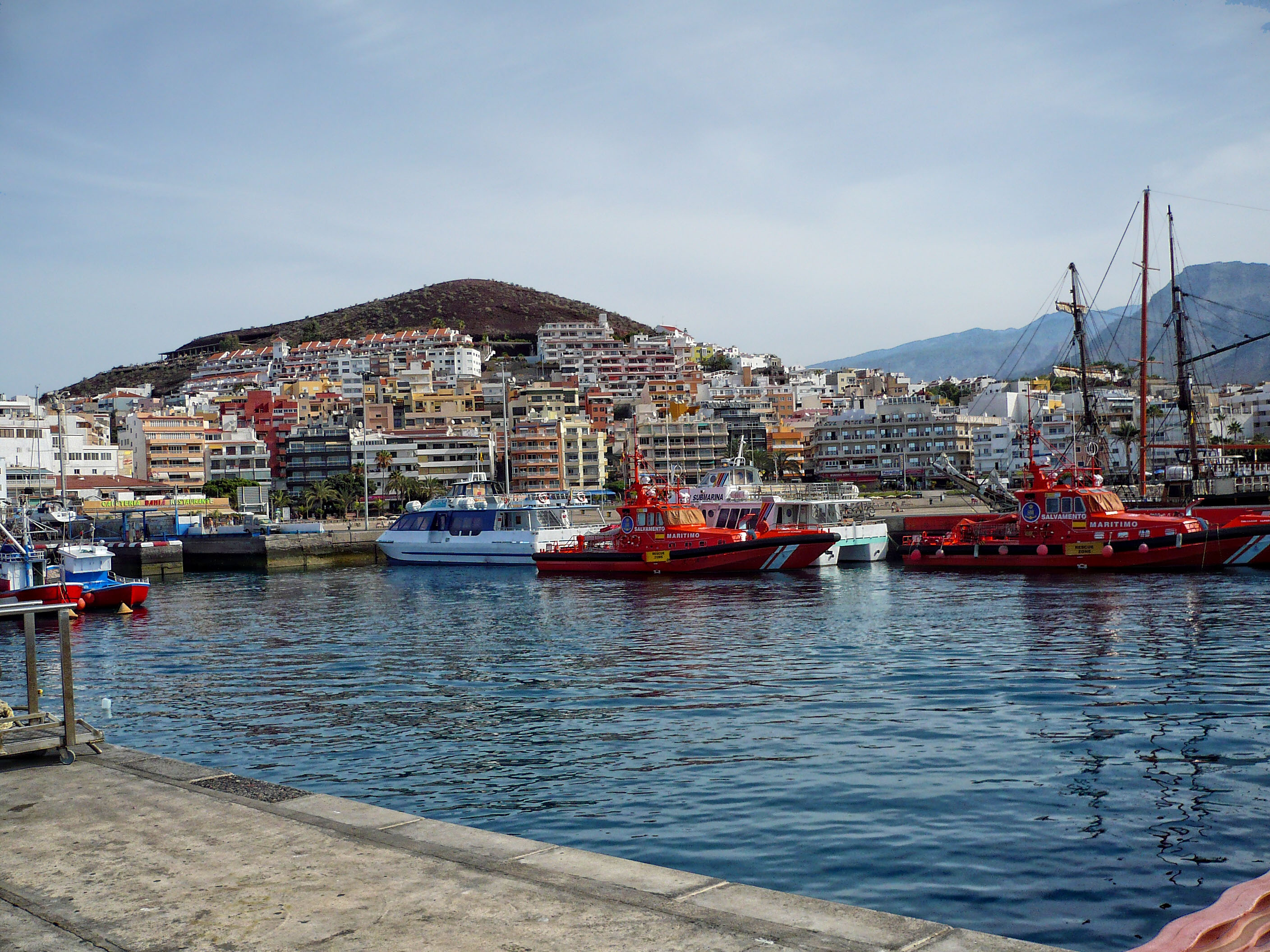 Los Cristianos